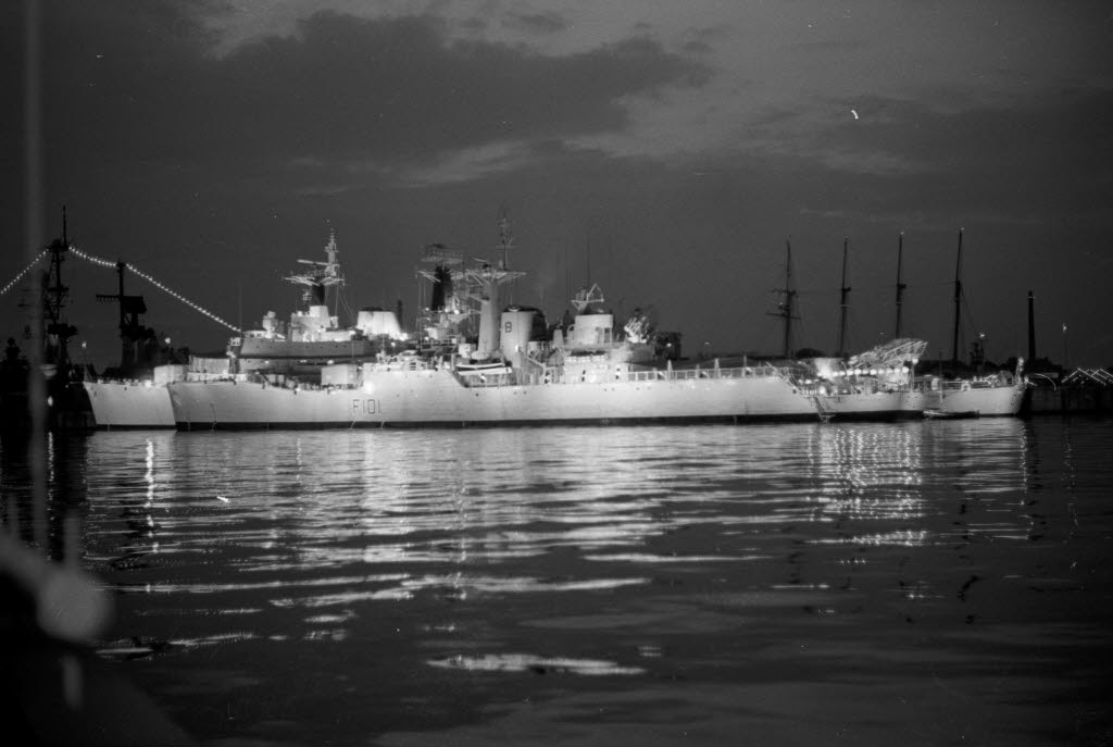 Im Bild vorn die Fregatte YARMOUTH (brit., F 101), dahinter der Zerstörer HAMPSHIRE (brit., D 06).